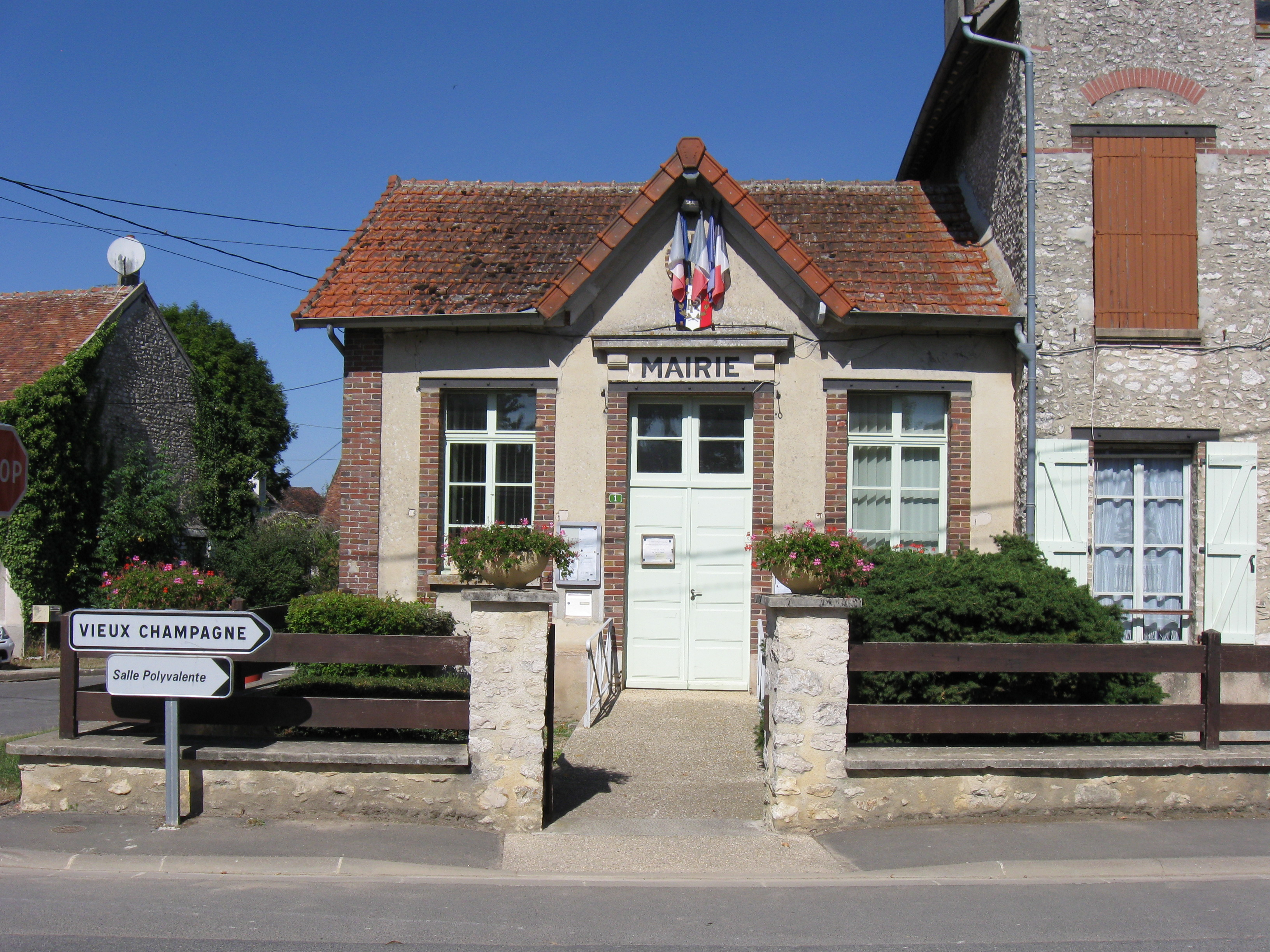 Mairie de Châteaubleau. (département de la Seine et Marne, région Île-de-France).